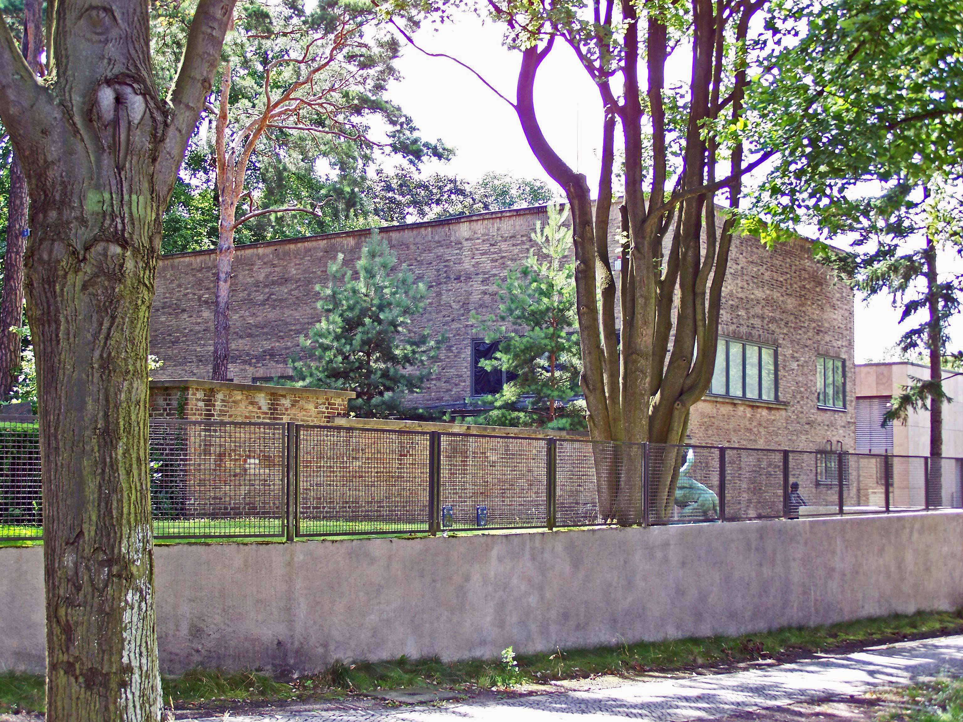 Kolbe-Museum in Berlin